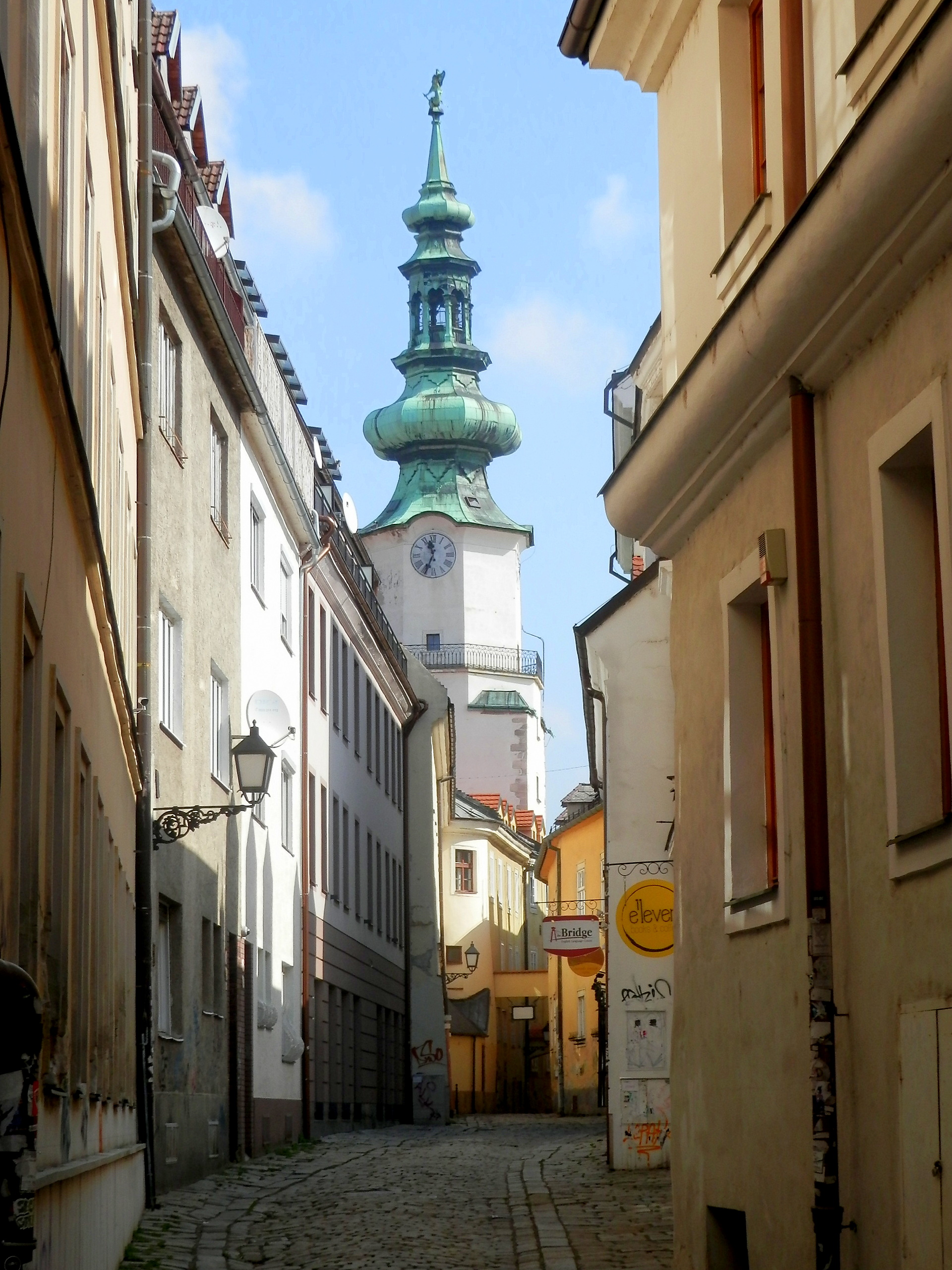 Biela sobota 2016. Baštová ulica.V pozadí Michalská veža. Bratislava